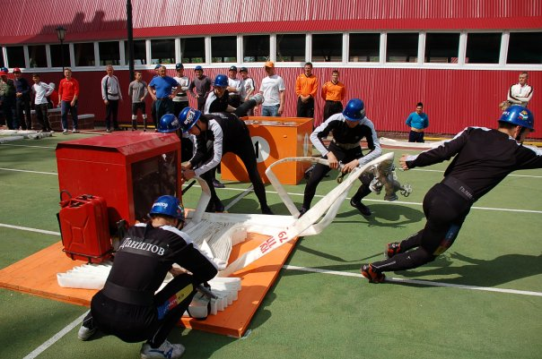 Команда выполняет боевое развёртывание от мотопомпы